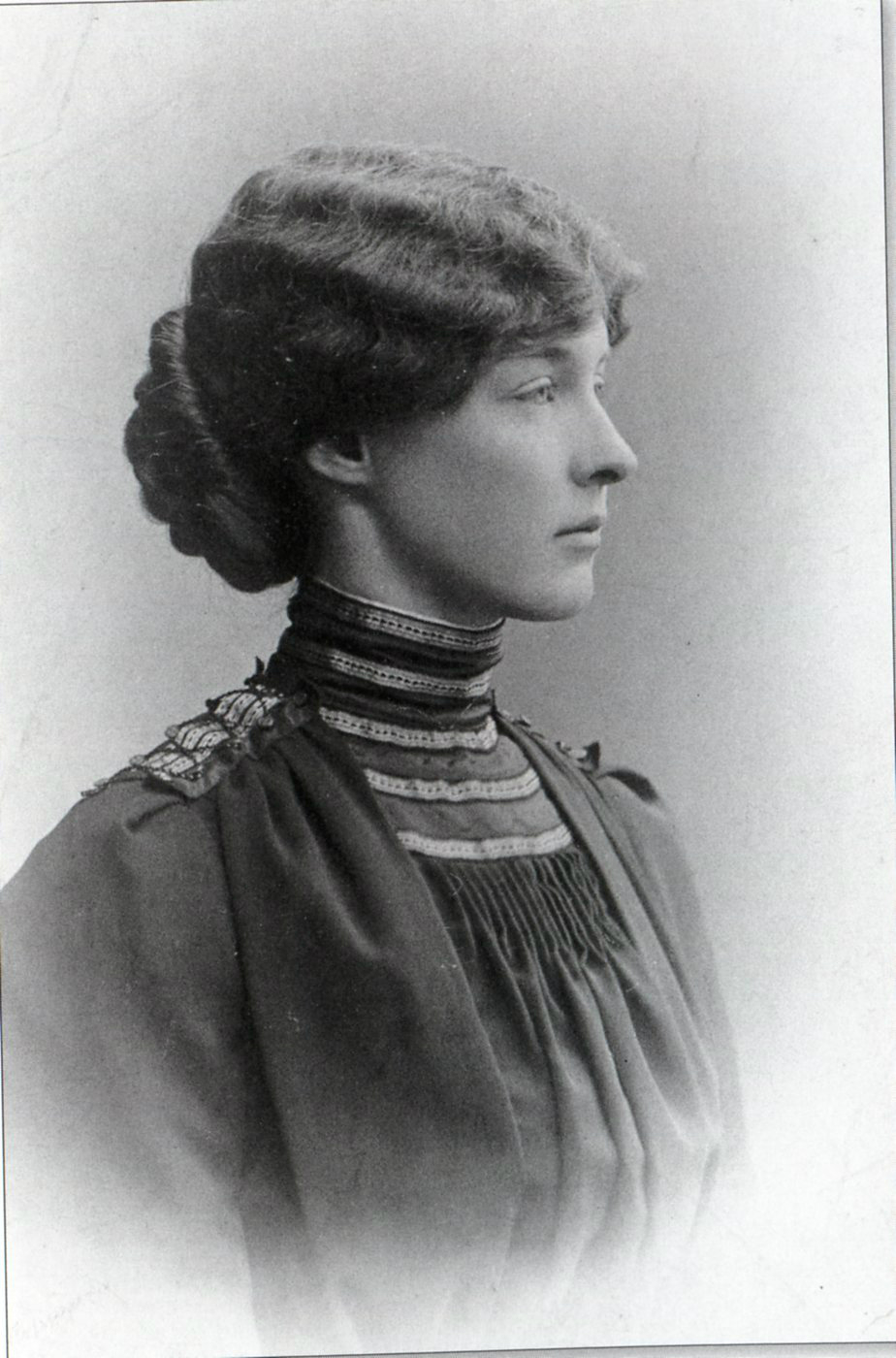 SAR LA PRINCESSE ISABELLE D'ORLÉANS, DUCHESSE DE GUISE